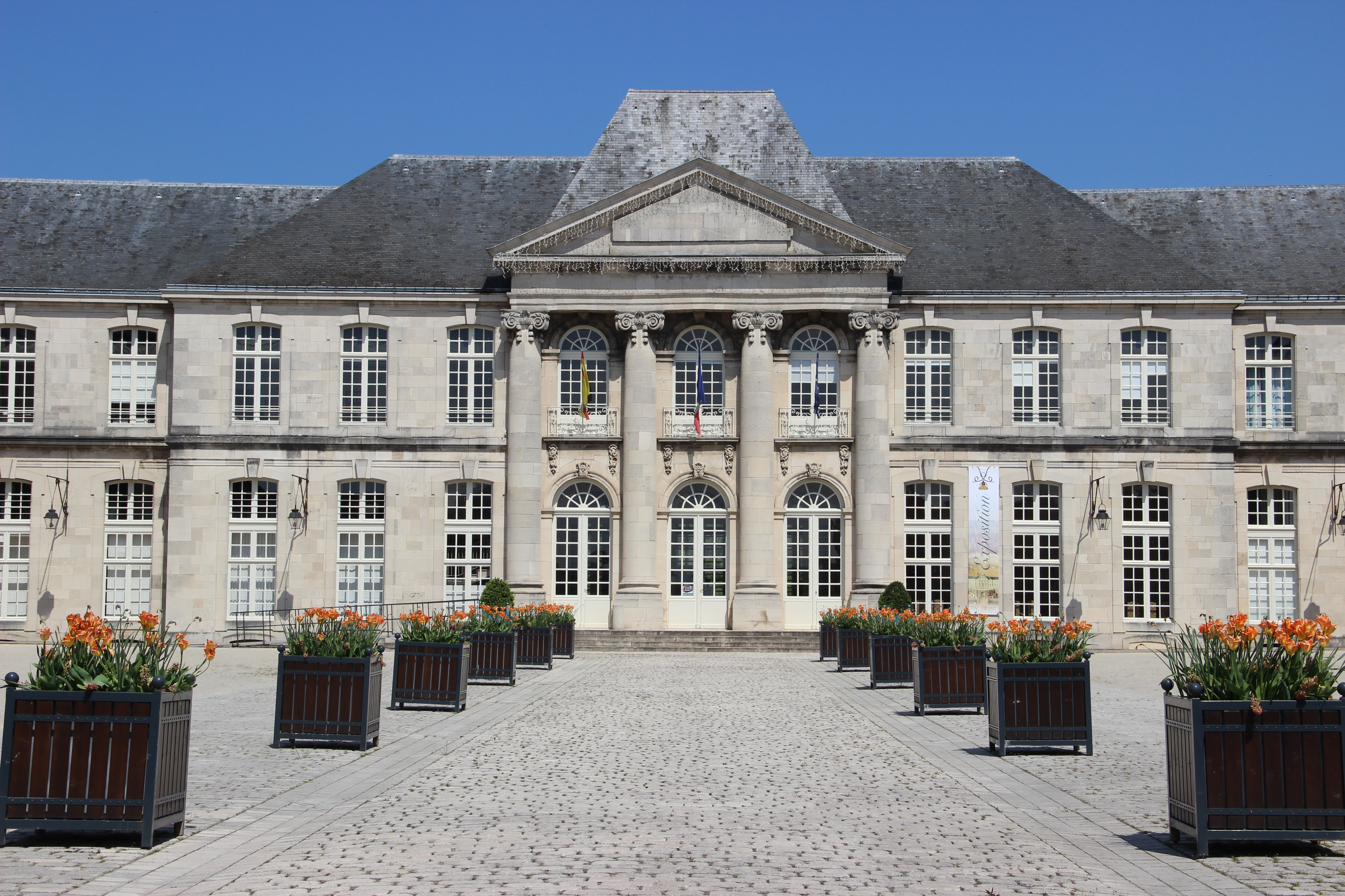 Façade avant du château